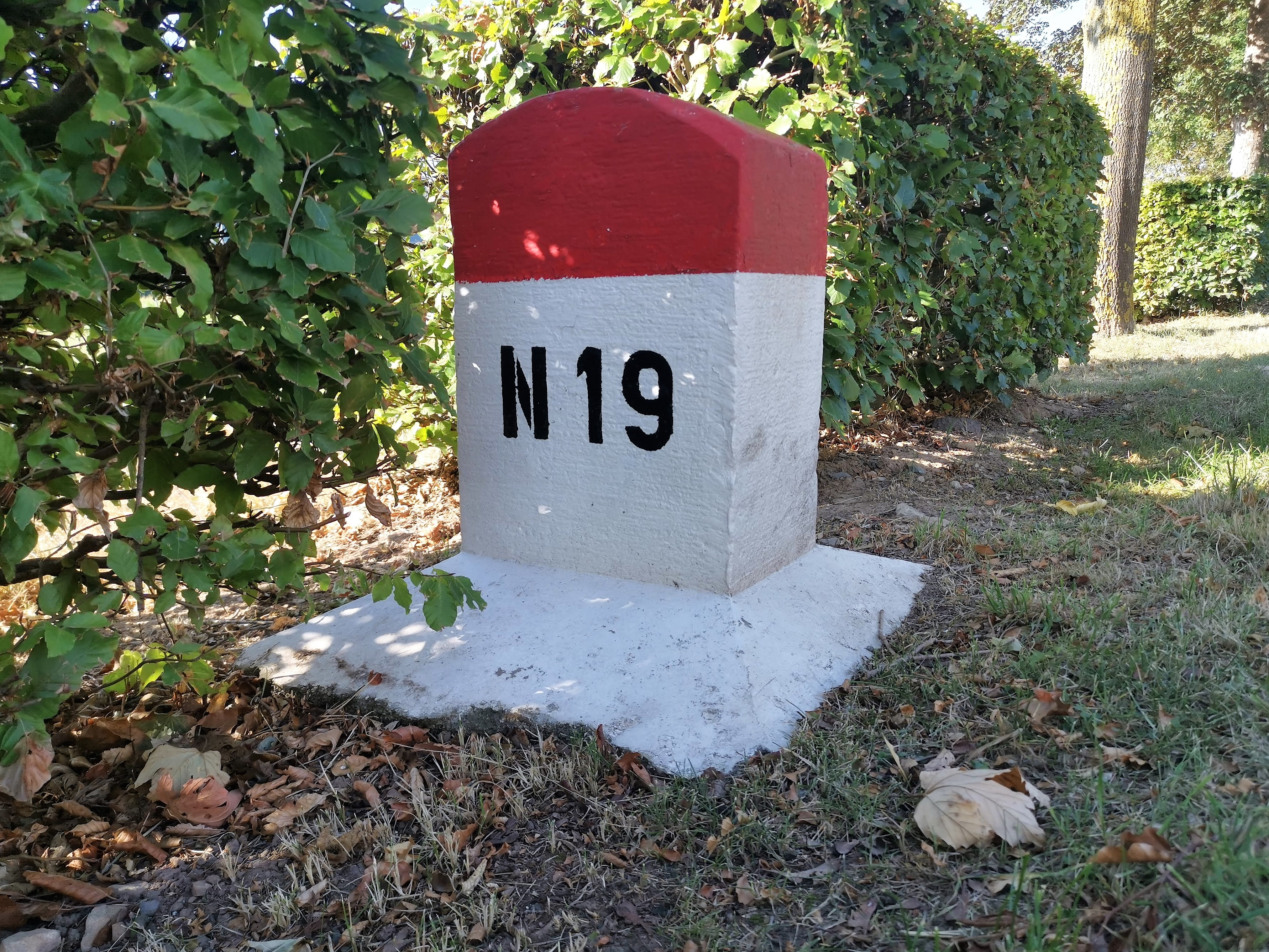 Borne kilométrique sur la N19 à Bettendorf.